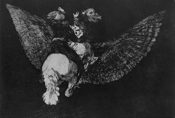 Disparate nº 5. Disparate volante.